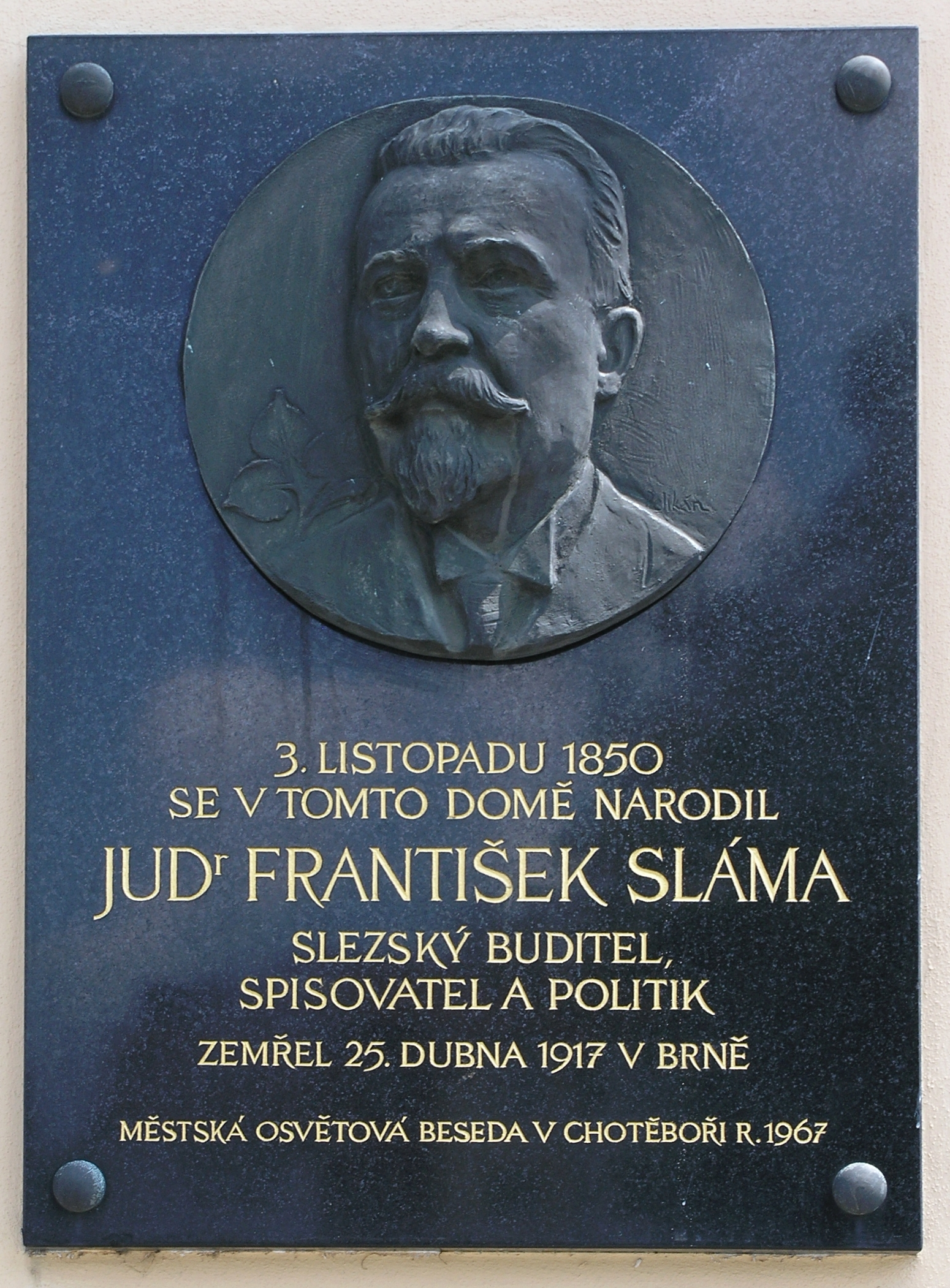 Chotěboř - JUDr. František Sláma